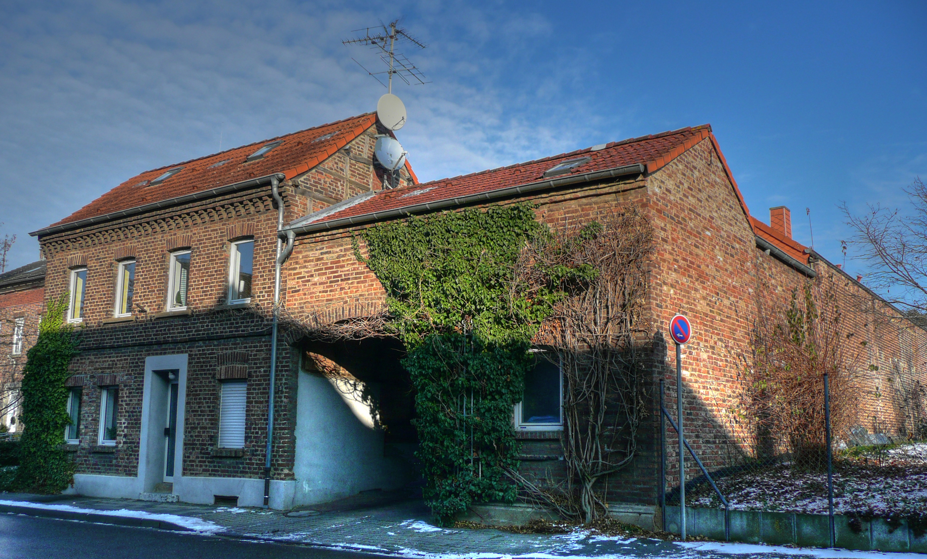 Anwesen in Morschenich (Gemeinde Merzenich) Das Anwesen,(Bauernhof)wurde zu einem Reiterhof umgebaut.